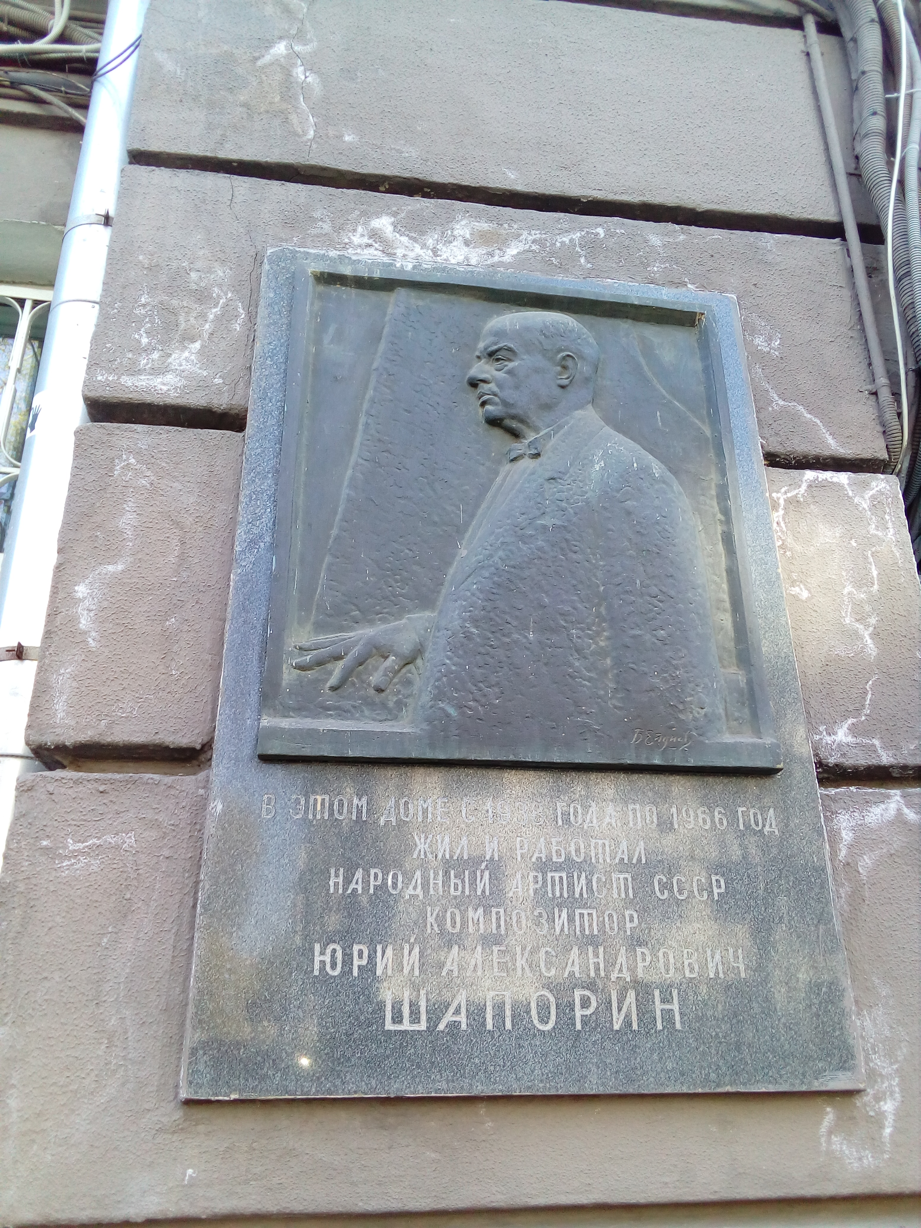 Мемориальная доска памяти Ю.А.Шапорина на доме на улице Чаянова, 10. 30 апреля 2018г.